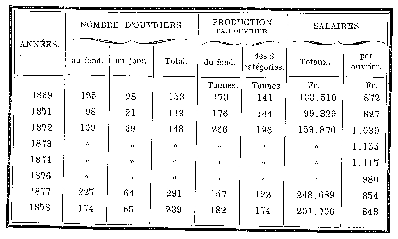 Ouvriers, rendement, et salaires de la Compagnie des mines d'Ostricourt de 1869 à 1878.